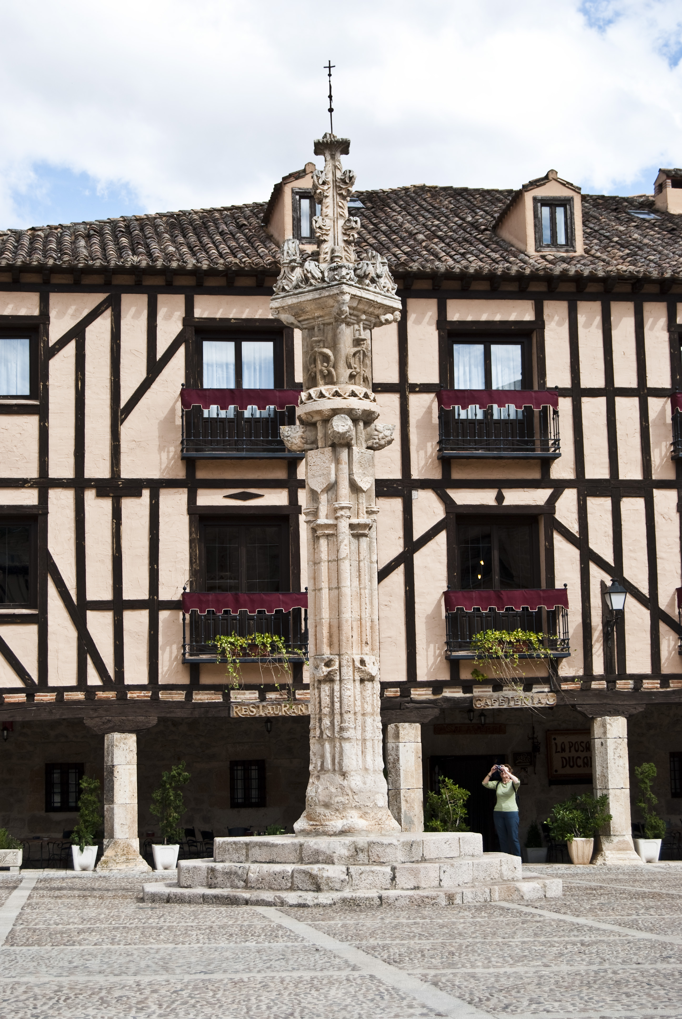 Rollo de jurisdicción en la plaza mayor de Peñaranda de Duero. España.